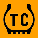 Témoin de l'antipatinage